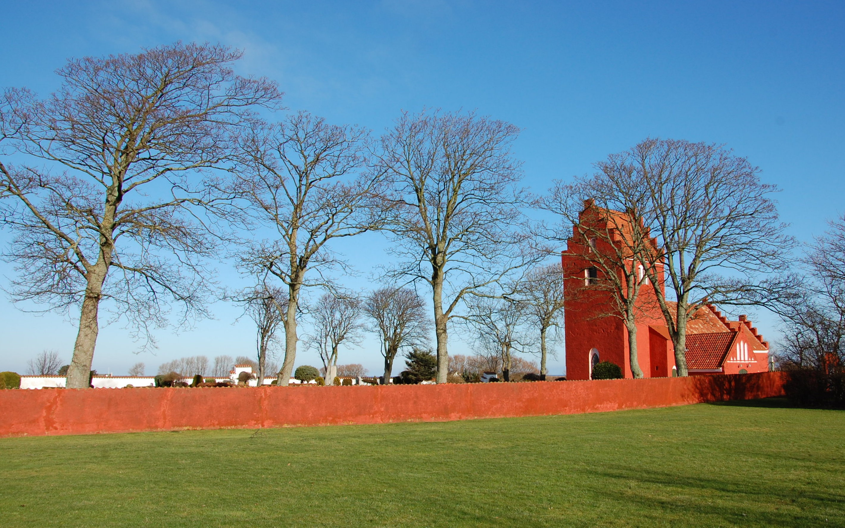 Odden kirke Blick vom Lapedarium